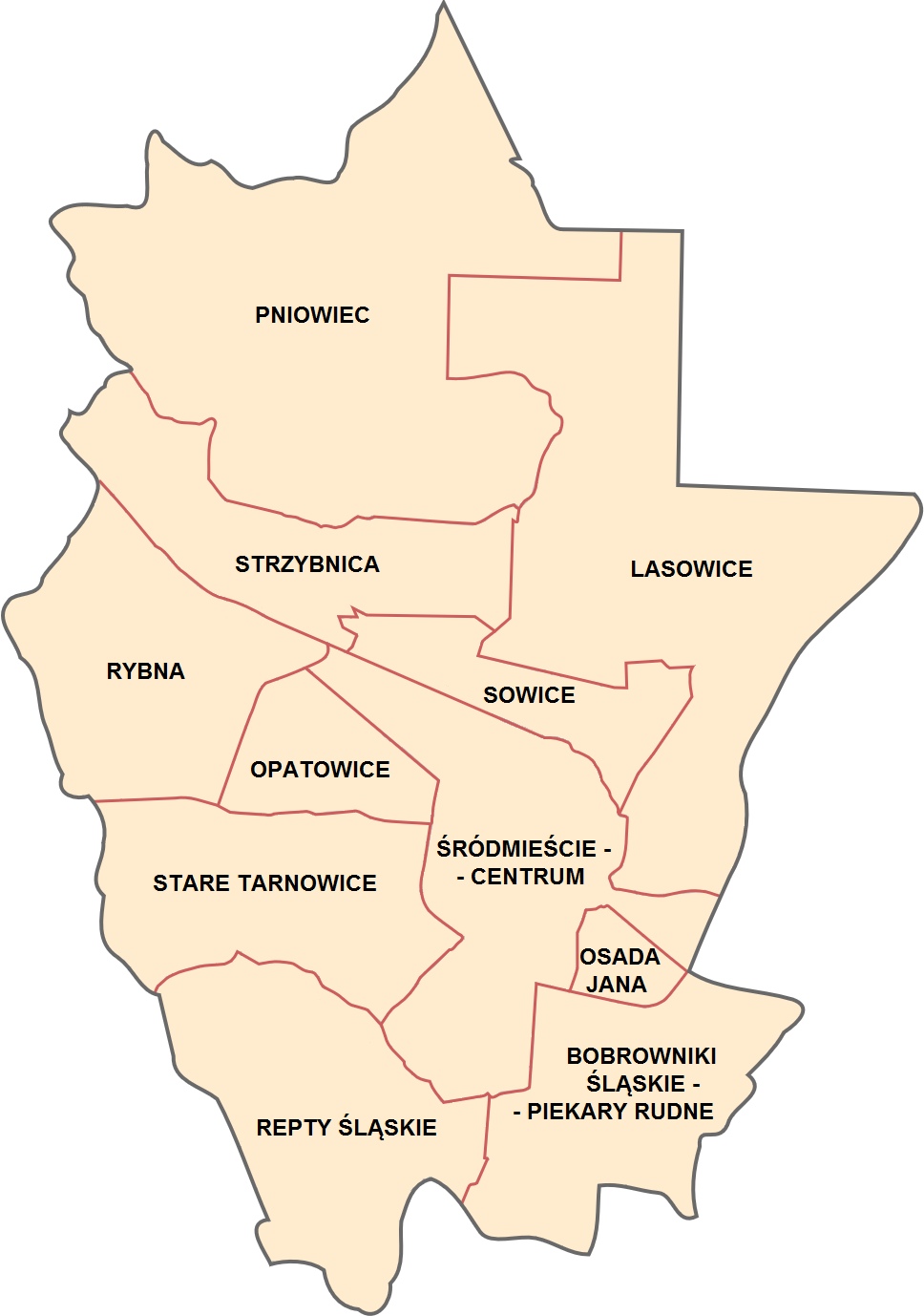 Mapa dzielnic Tarnowskich Gór